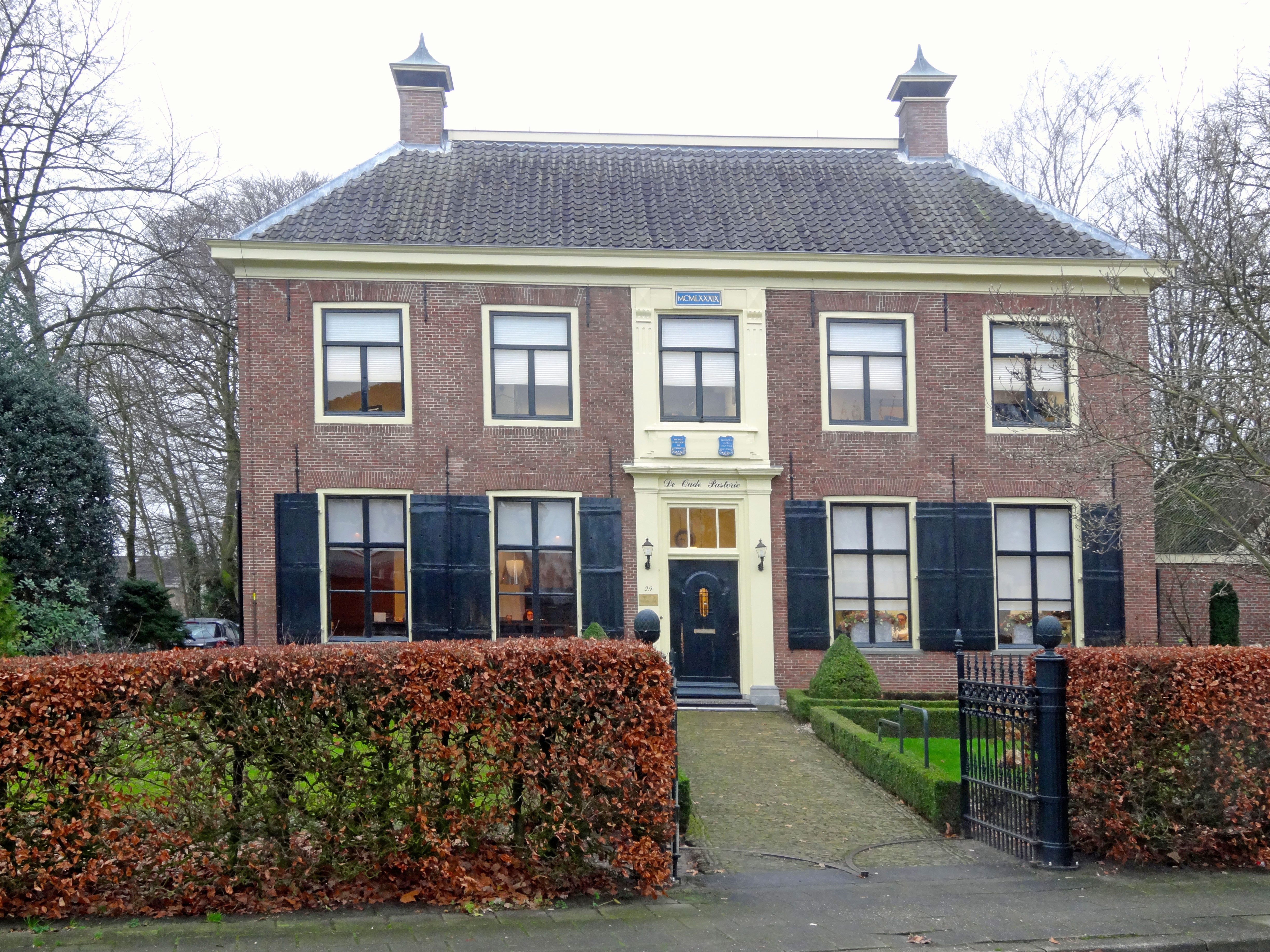 De oude pastorie in Voorthuizen